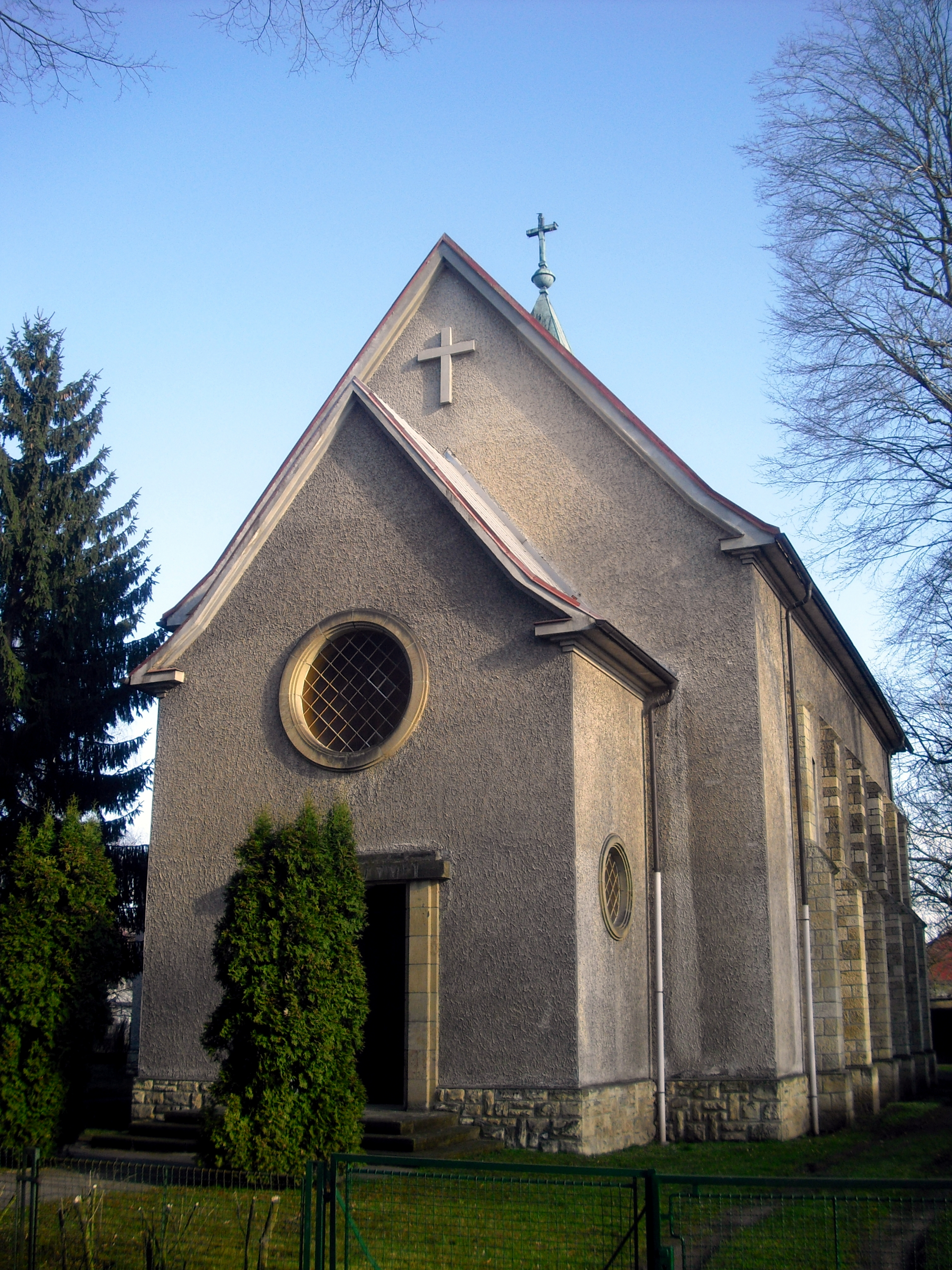 Kostel Farního sboru ČCE v Moravské Třebové se vstupem ze Svitavské ulice.